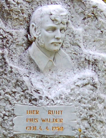 Grabmal der Familie Walder in Kalkstein (Gemeinde Innervillgraten)